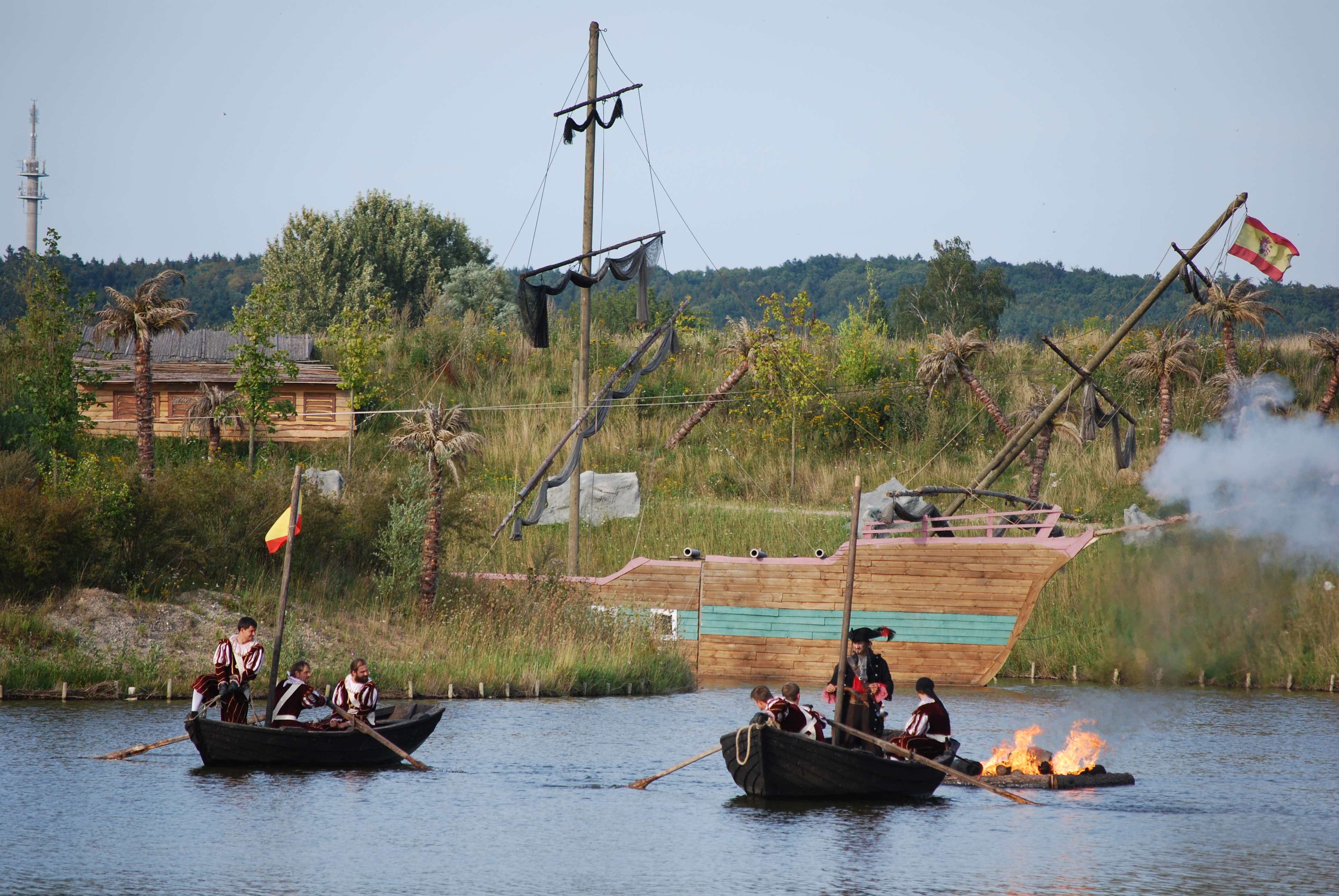 Piraten-Open-Air, Szene aus "Im Auftrag der Krone"